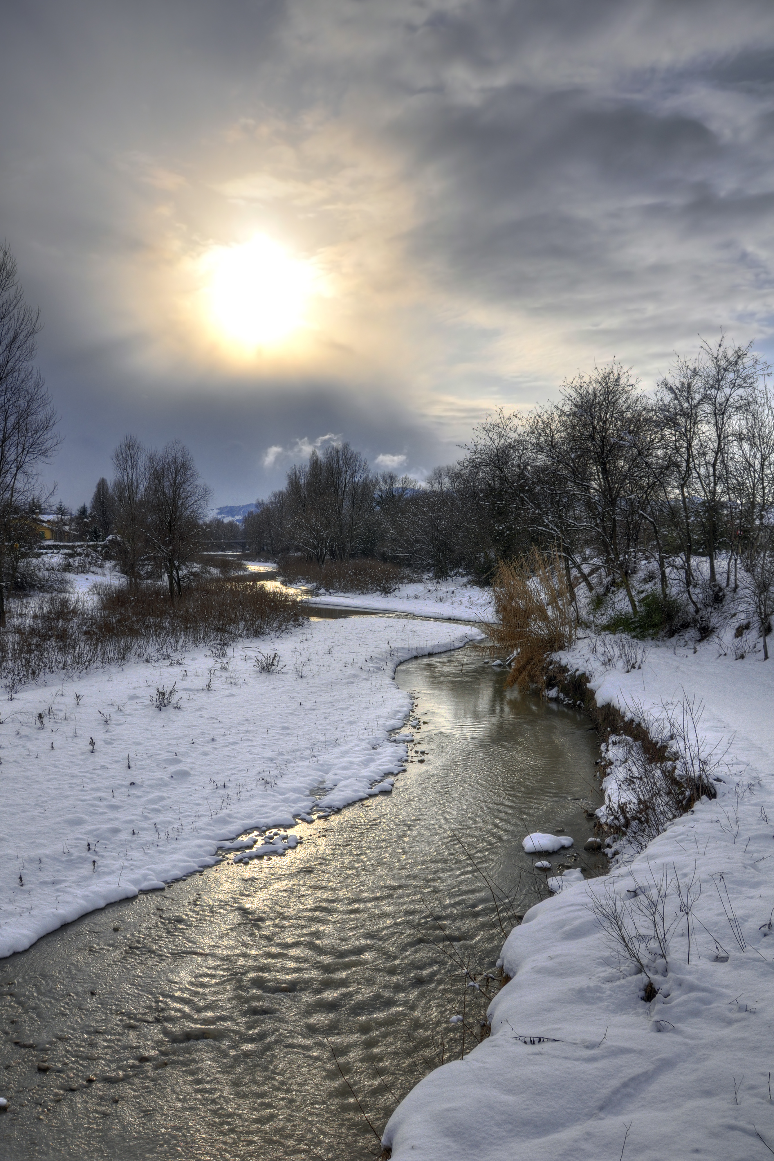 Torrente Tresinaro - Scandiano, Reggio Emilia, Italia